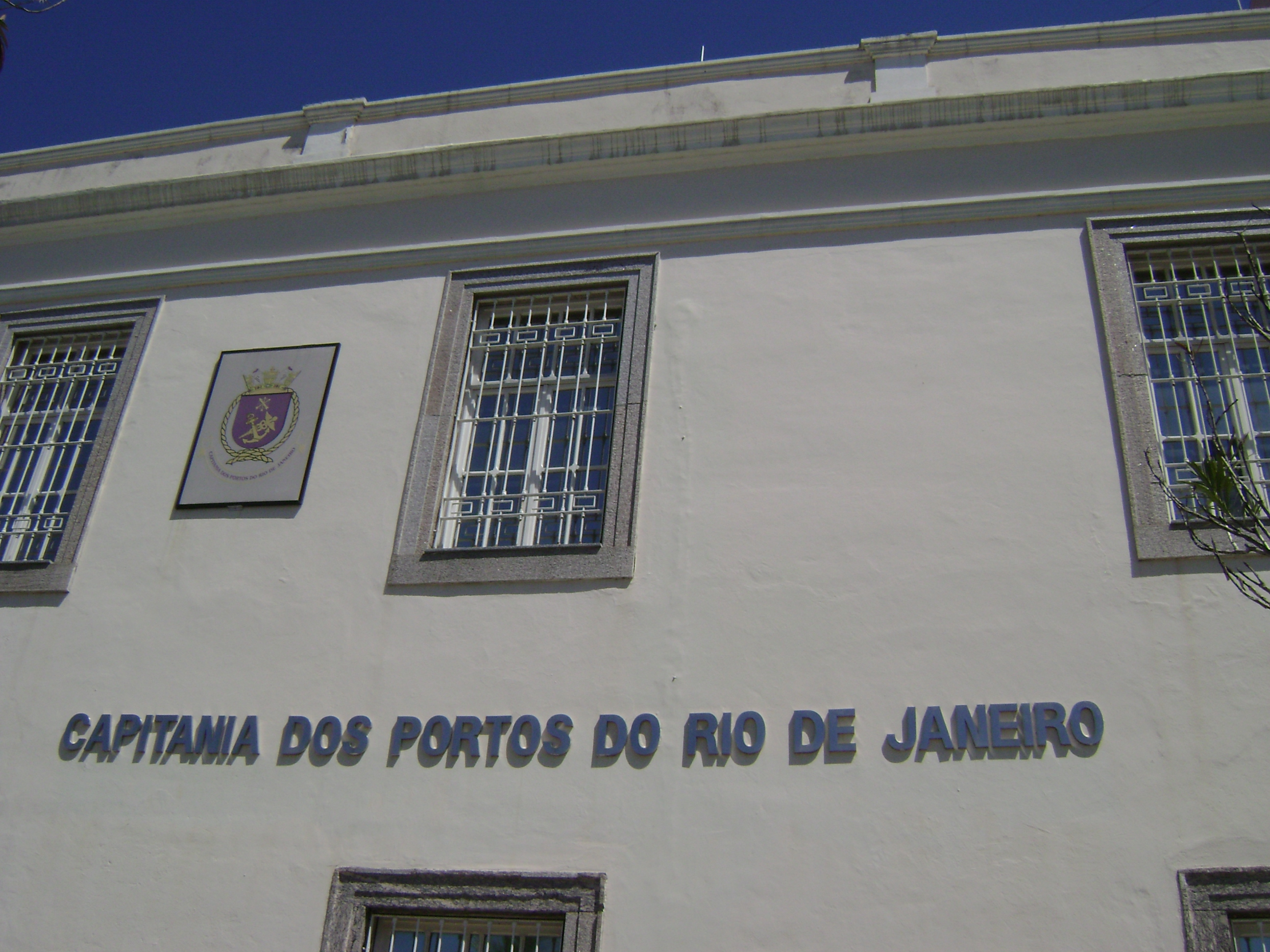 Capitania dos Portos, na cidade do Rio de Janeiro, Brasil.